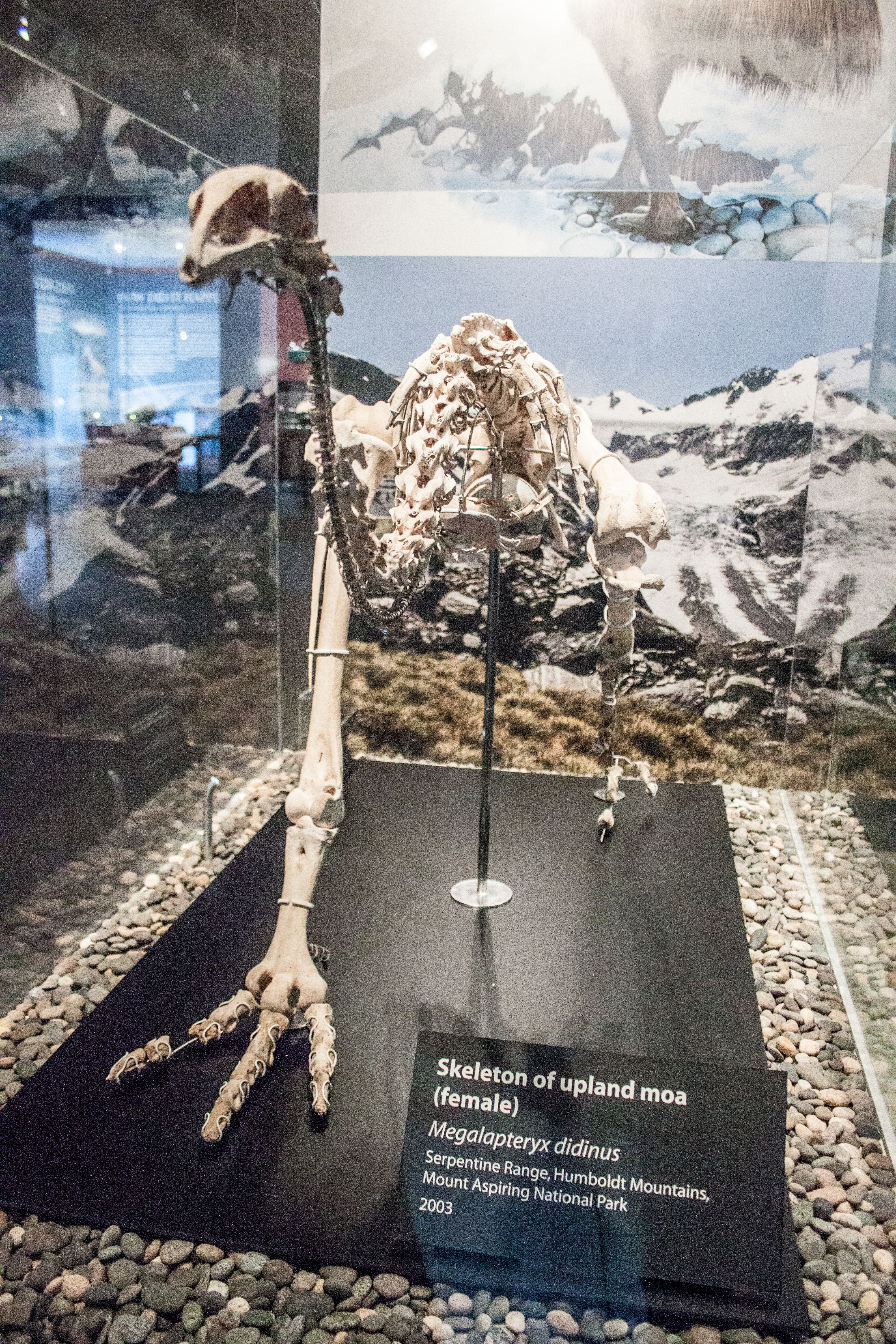 Upland moa skeleton